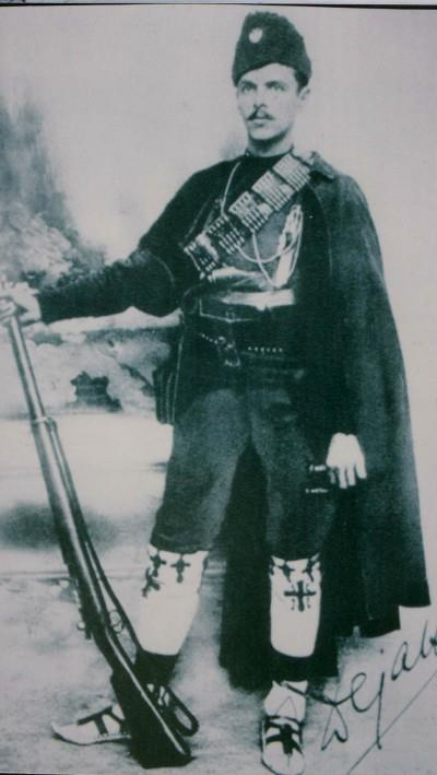 Vojvoda Dragomir Dejan Popović Jekić